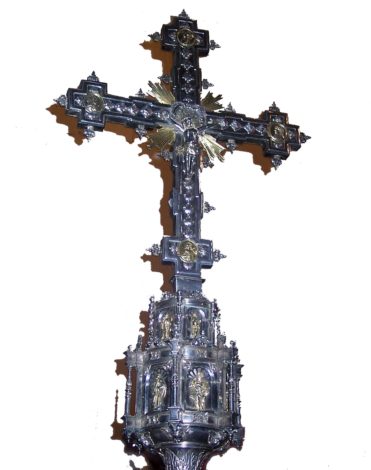 SIGLO XVI